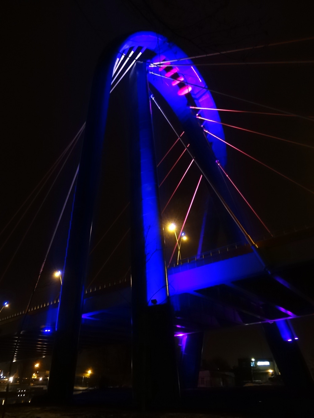 Pylon Trasy Uniwersyteckiej w Bydgoszczy nocą